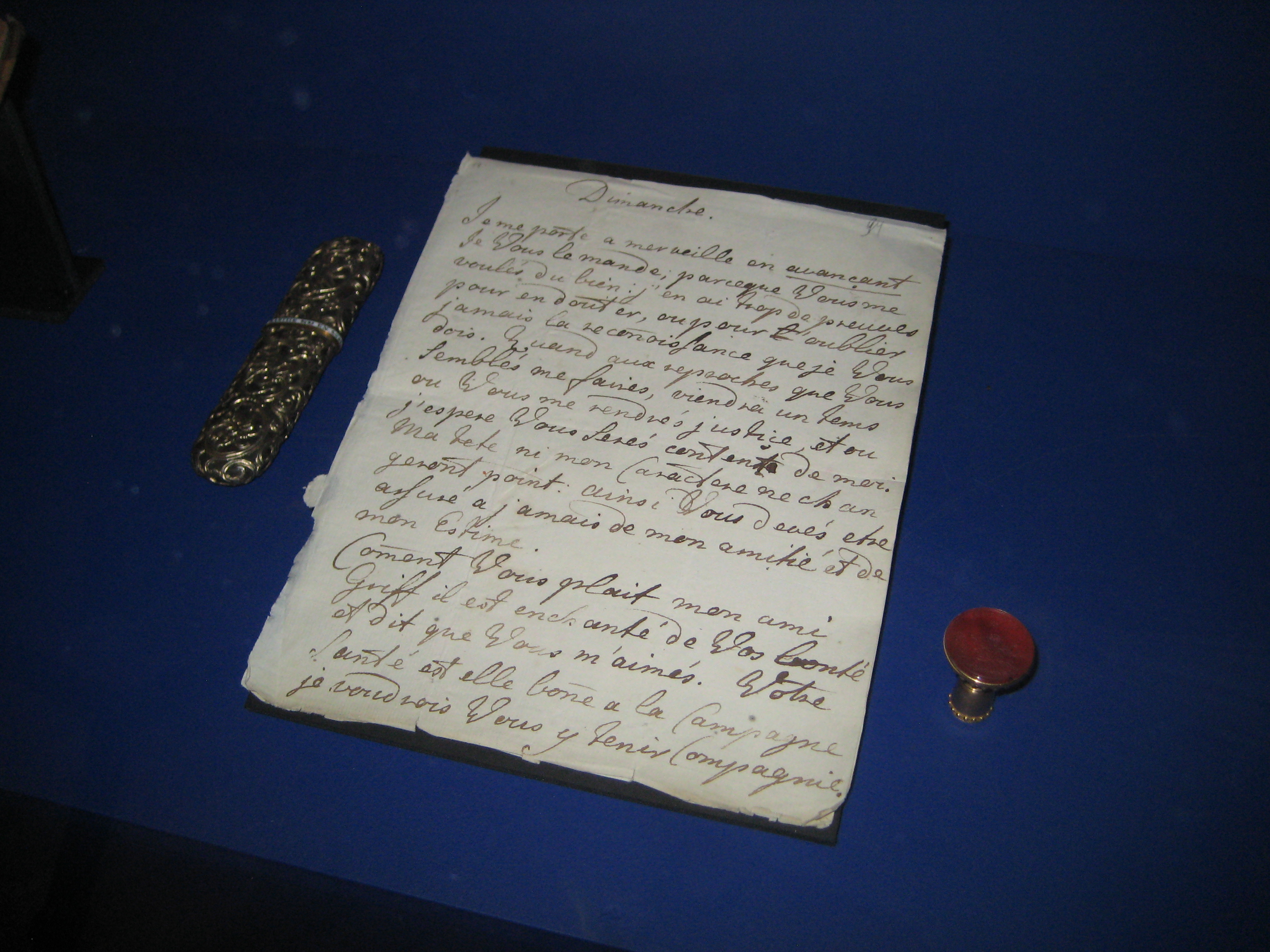 Письмо вел. кн. Екатерины Алексеевны английскому посланнику Ч.Г. Уильямсу. 1756 г. Автограф. Фр. яз. РГАДА. Футляр для очков. Англия, 2-я пол. 18 века. ГИМ. Серебро, яшма, эмаль Печать настольная Екатерины II, Россия, сер. 18 в. Золото, сердолик. ГИМ